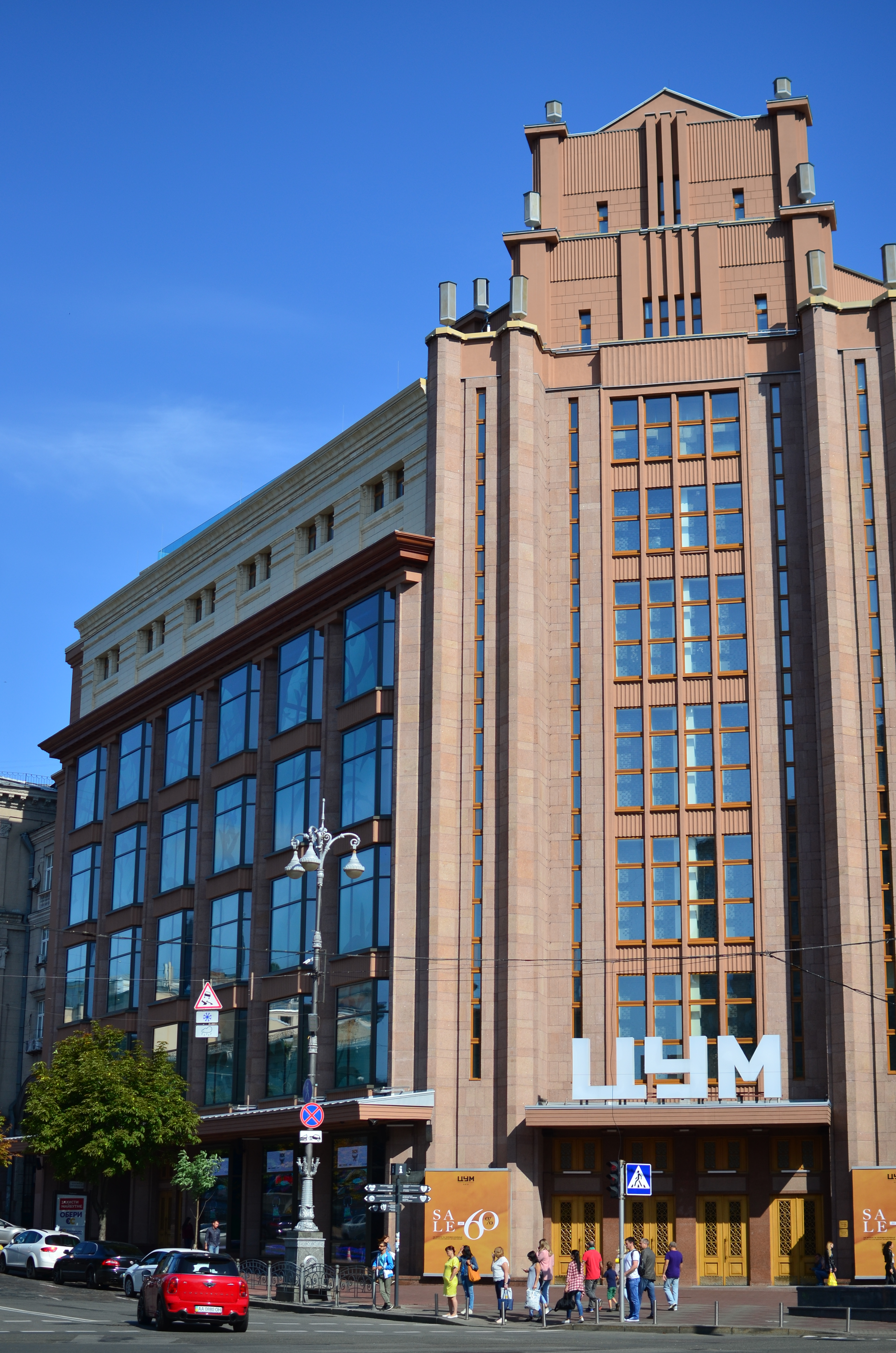 Центральний універмаг, Київ, вул. Хрещатик, 38/2